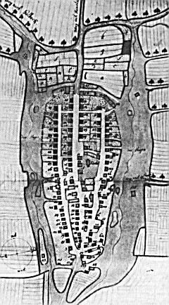 Bösingfeld um 1756, heute Gemeinde Extertal